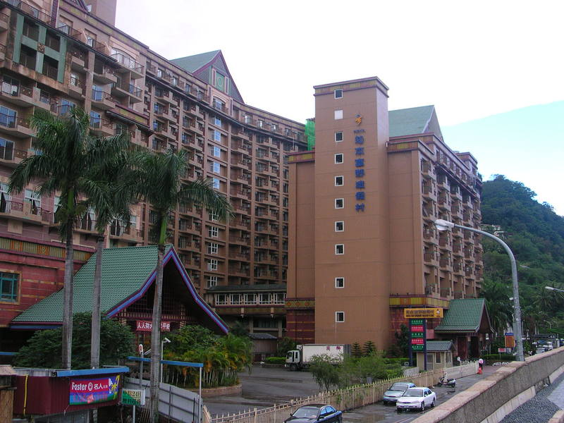 知本富野渡假村，2008年更名為高野大飯店。